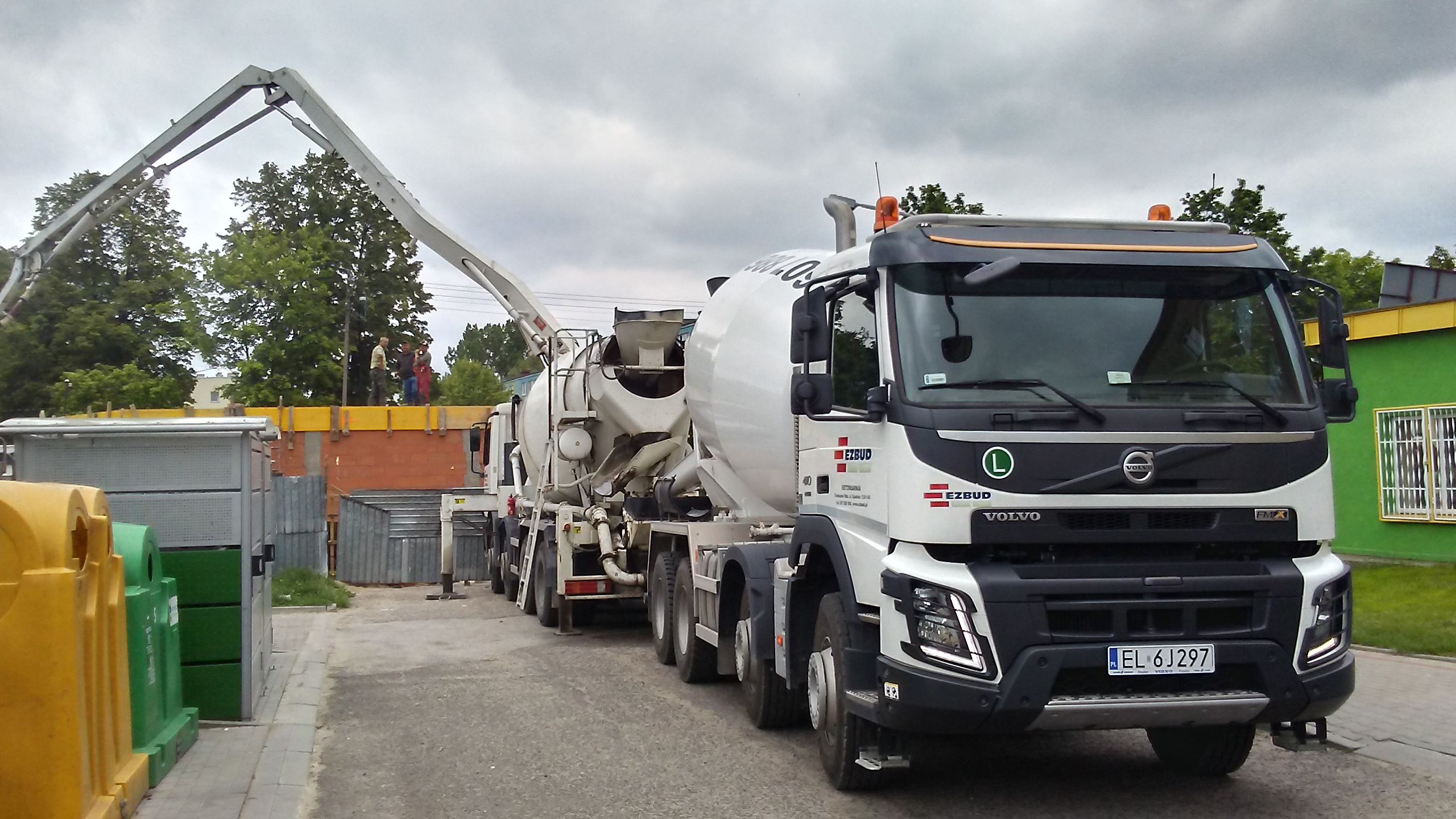 Tomaszów Mazowiecki w wojewodztwie łódzkim, PL, EU. Budowa lecznicy dla zwierząt domowych na osiedlu Hubala. CC0